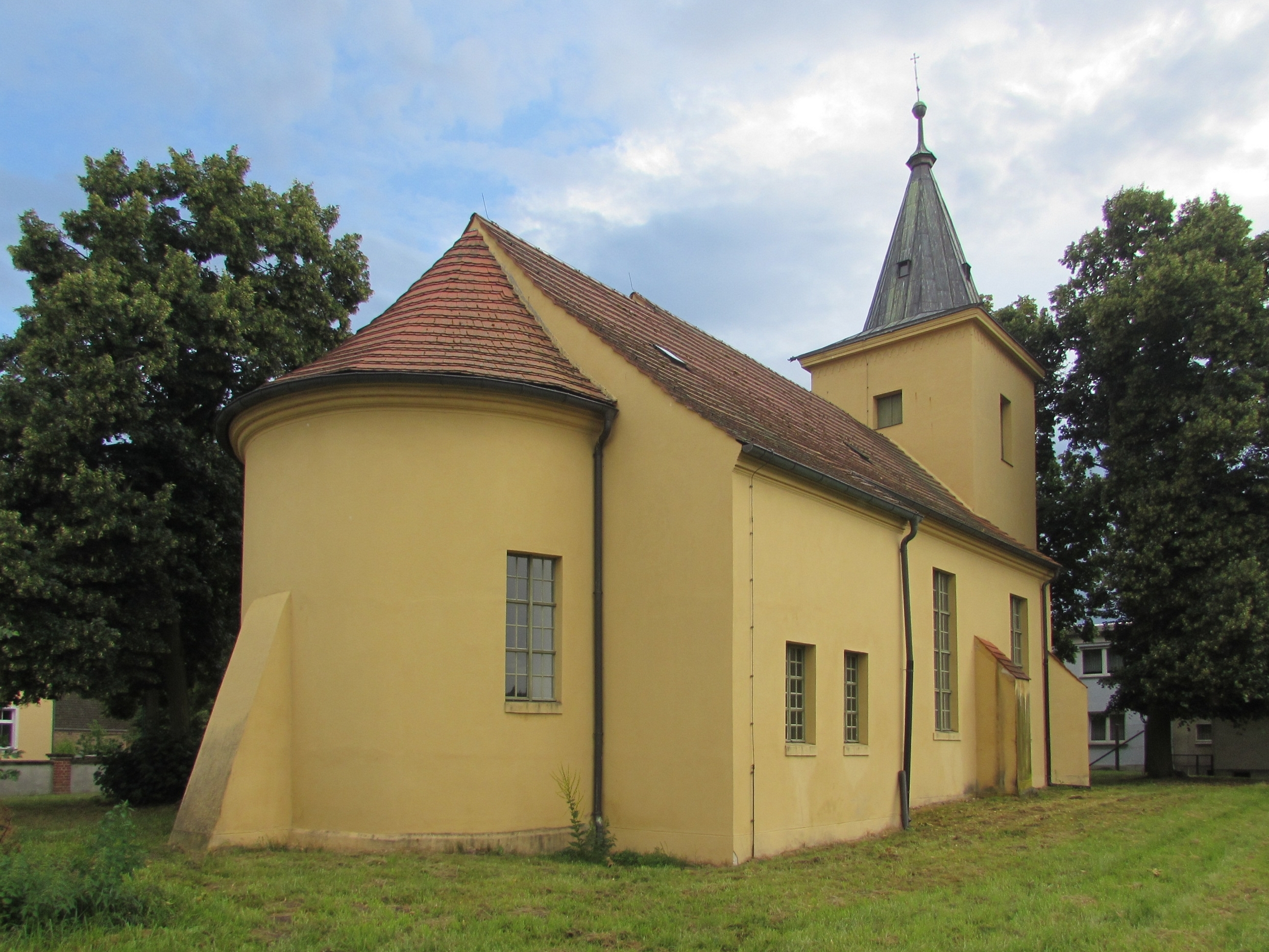 dorkirche altbensdorf